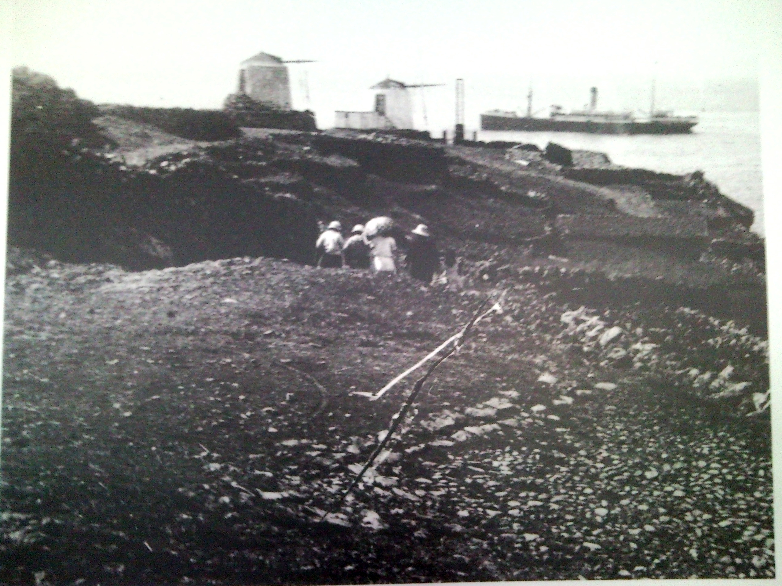 Corvo, início do Séc, XX, terrenos agrícolas, Porto da Casa, Arquivo de Villa Maria, Angra do Heroísmo, ilha Terceira, Açores